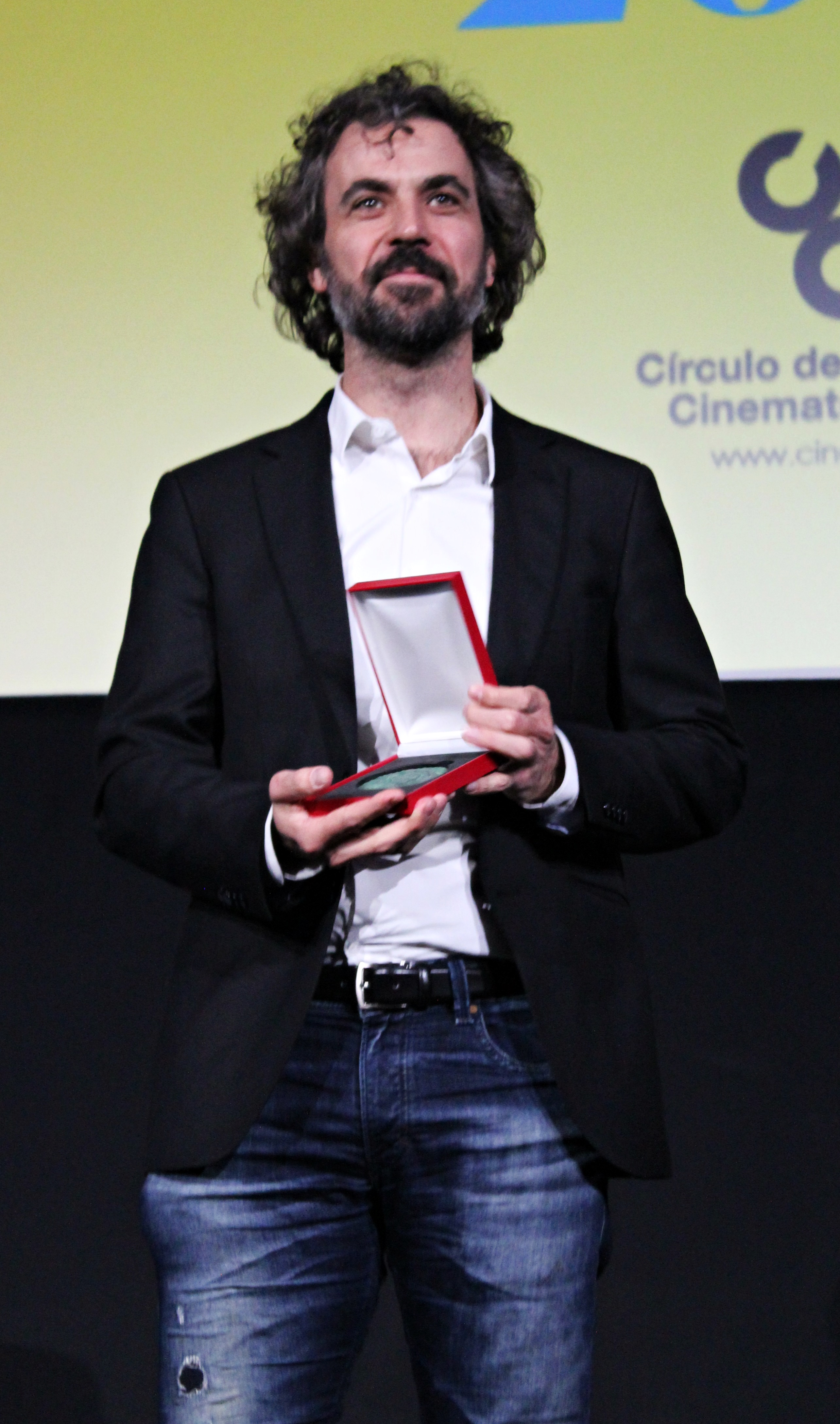 El cineasta uruguayo Álvaro Brechner muestra la Medalla del Círculo de Escritores Cinematográficos al mejor guion adaptado obtenida por su trabajo en la película La noche de 12 años.